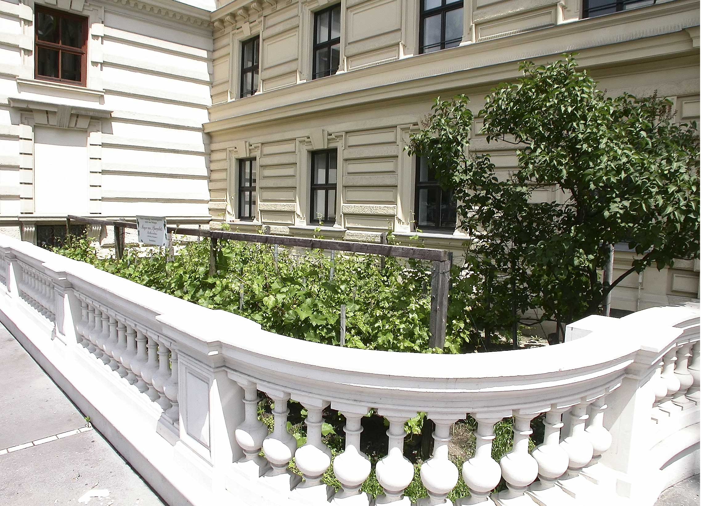 Wiens kleinster Weingarten (am Schwarzenbergplatz), Sommer, Tag, Ansicht in Richtung Nordosten